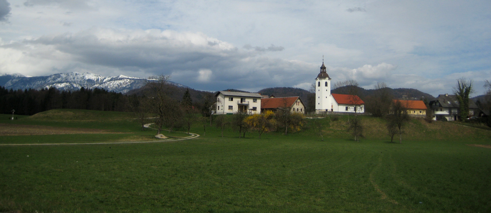 Volčji Potok, village in Slovenia (church of St. Ožbolt)